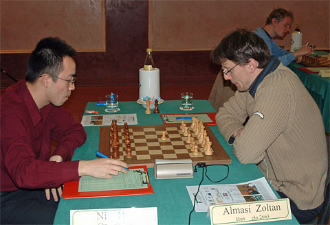 Foto della partita Zoltan Almasi-Ni Hua, 51° torneo di Capodanno di Reggio Emilia